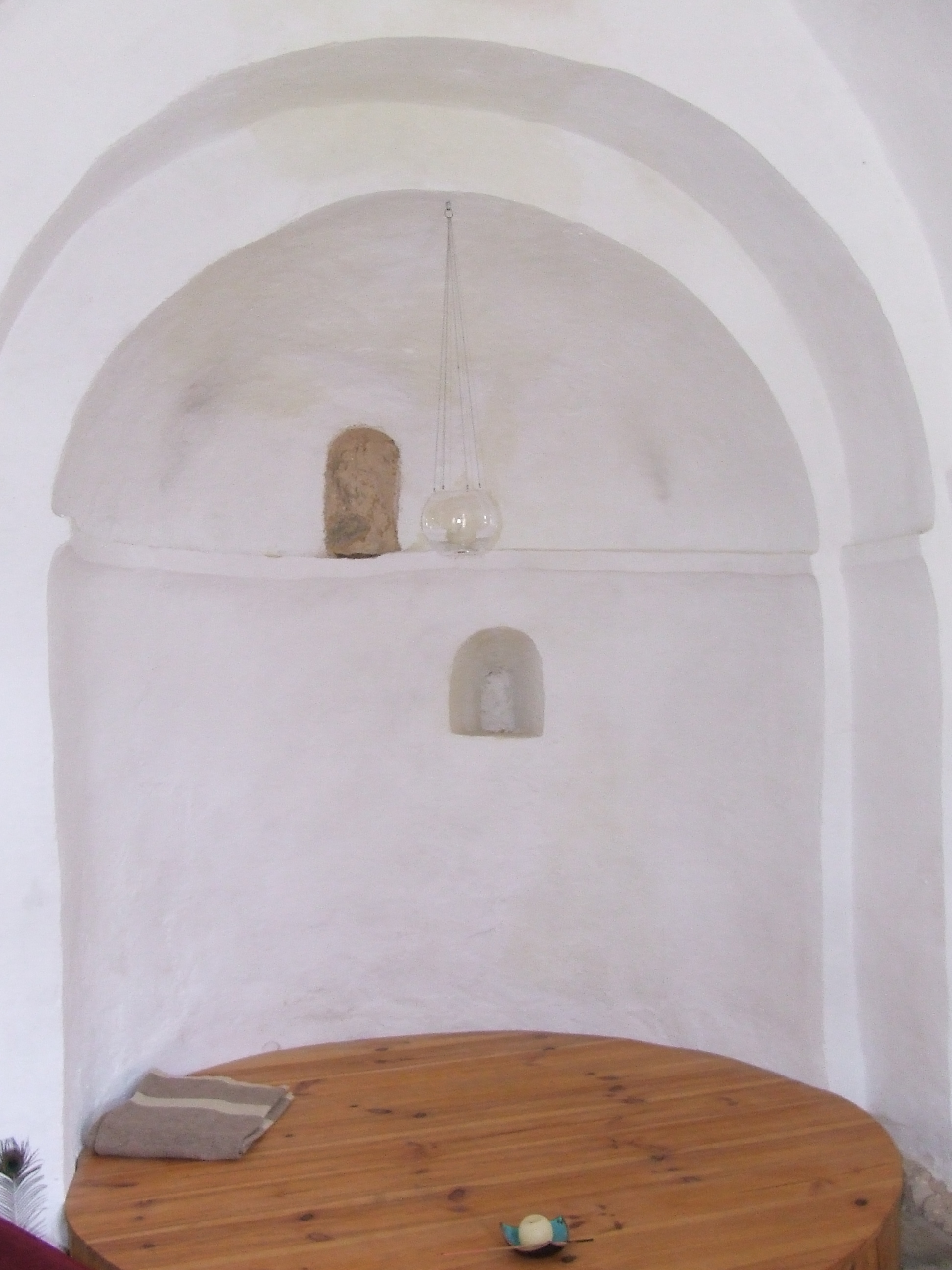 Interior de la Santíssima Trinitat de Faidella (Abella de la Conca, Pallars Jussà)